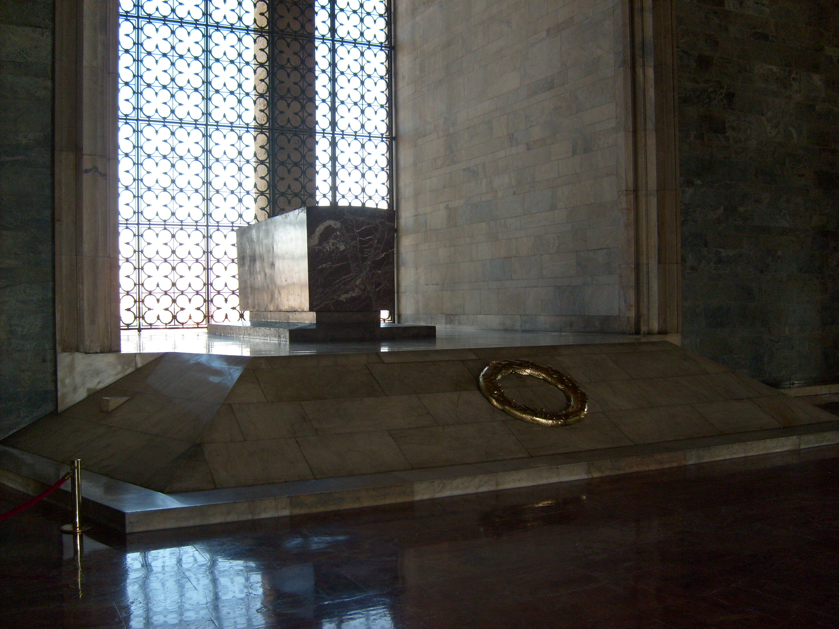 Atatürk'ün mozolesi, Ankara-Anıtkabir (3 Kasım 2007)